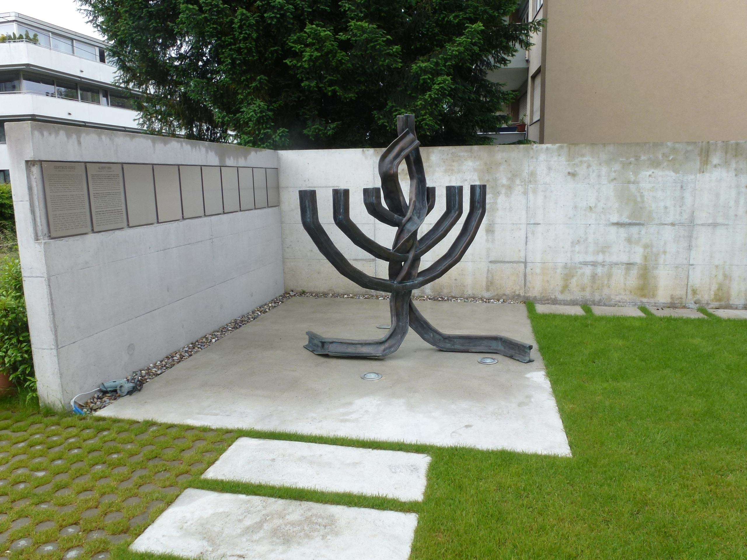 Riehen, Gedenkstätte für Flüchtlinge. Die auf dem Vorplatz errichtete Skulptur «Rail Menora» thematisiert die Ausweglosigkeit. Die einzige Öffnung für viele Flüchtlinge führte zu den Gleisen, die sie in die Vernichtungslager brachten. Das Mittelstück der «Rail Menora» besteht aus zwei verschlungenen Gleisen, die wie Flammen aufsteigen.